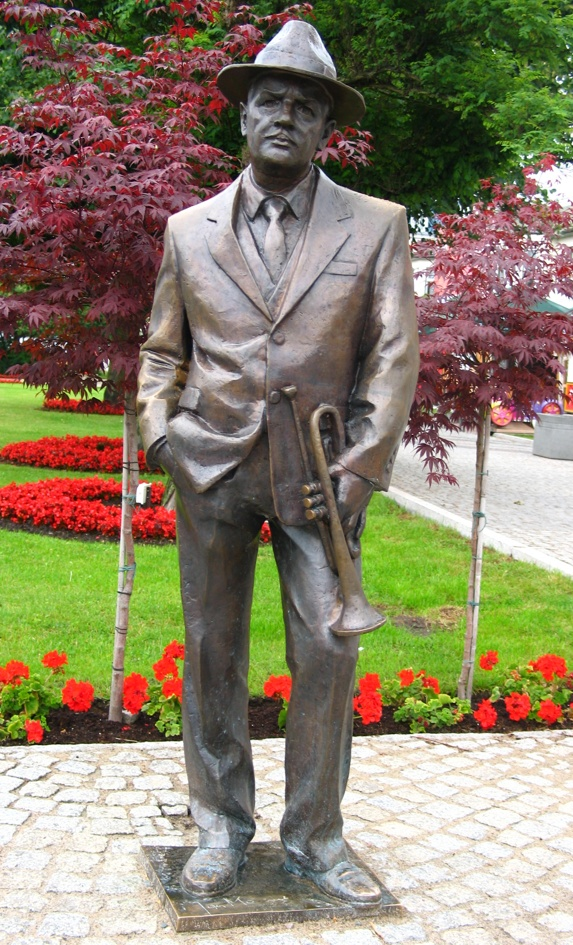 Pomnik Jana Machulskiego w Międzyzdrojach. Autor- Michał SelerowskiUnknown memorial of jan machulski polish actor in miedzyzdroje poland. made by artist michał selerowski